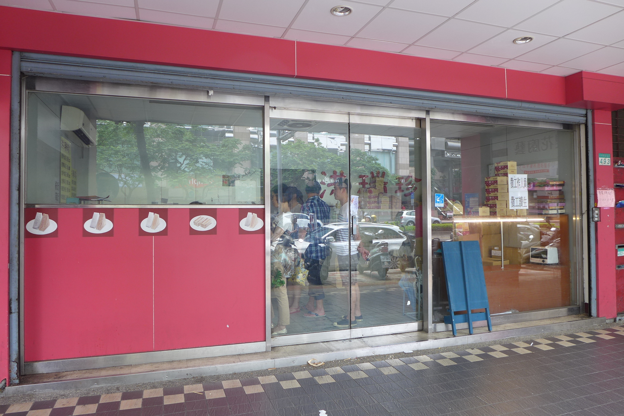 Horng Ryen Jen Sandwich Store in Taipei